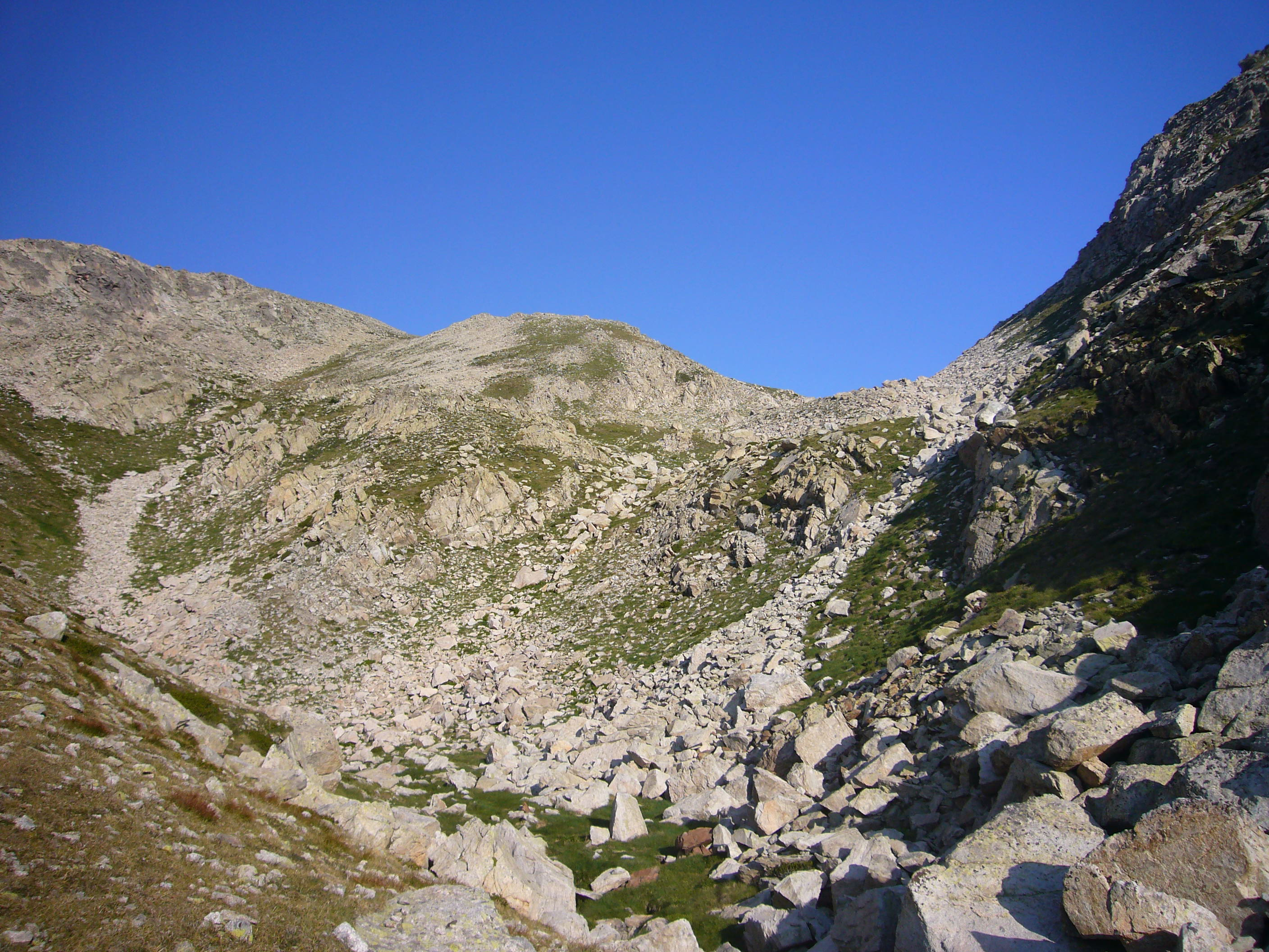 colladó del Pessó vista des de Francí; la Torre de Cabdella, Pallars Jussà, Catalunya